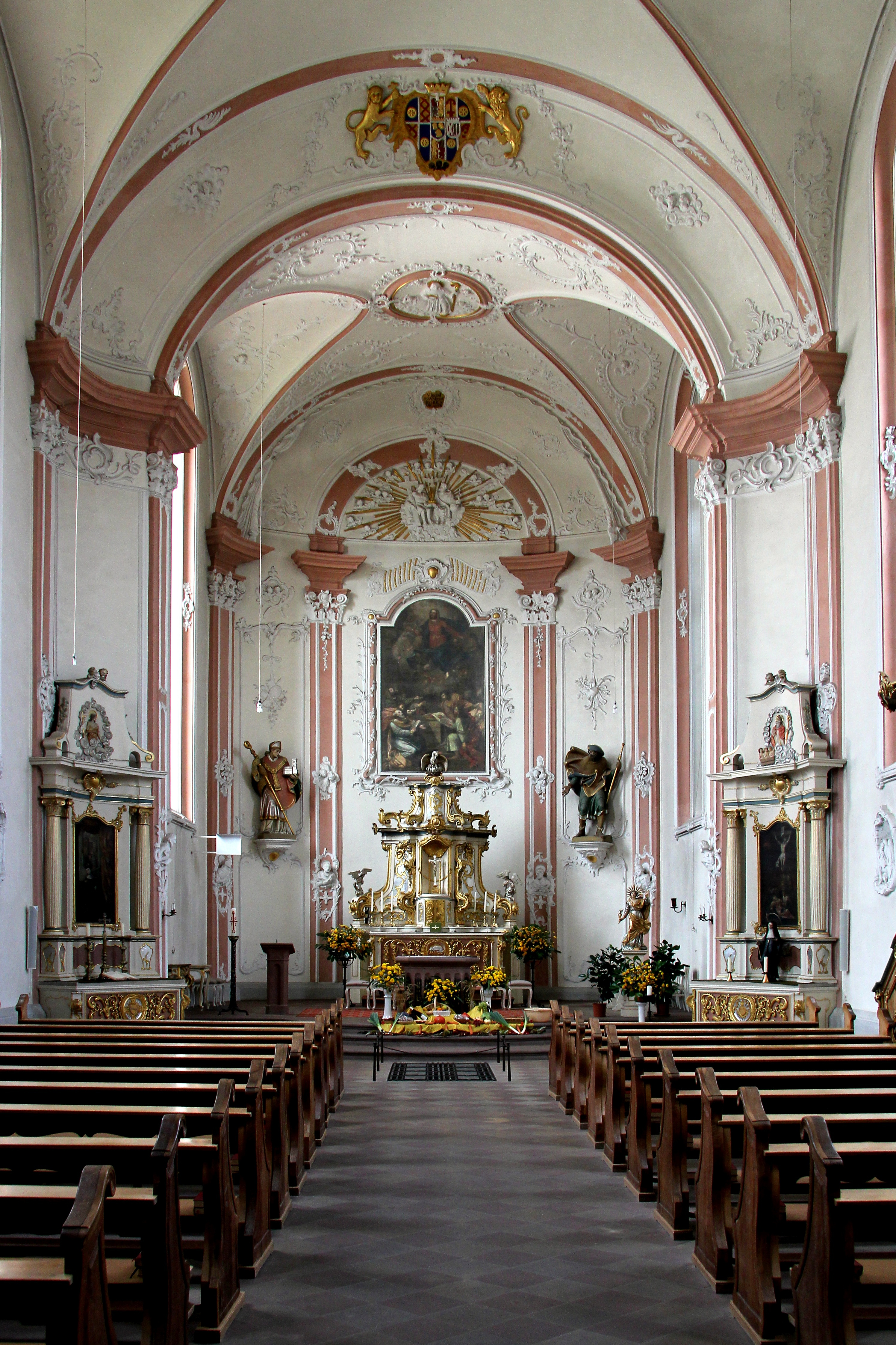 St. Irminen Trier, innen